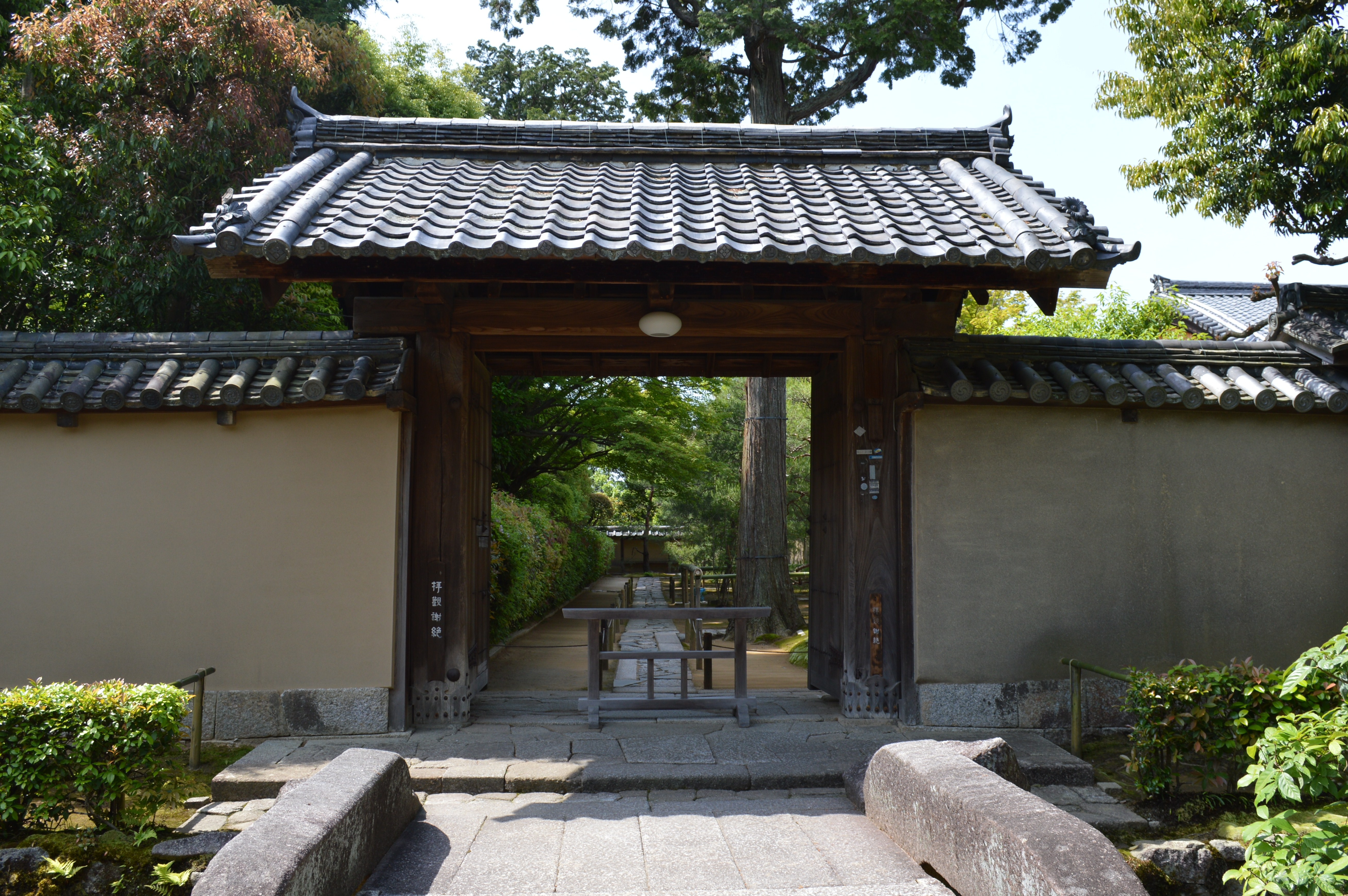 京都市北区紫野 臨済宗大徳寺派孤蓬庵（大徳寺塔頭） 山門